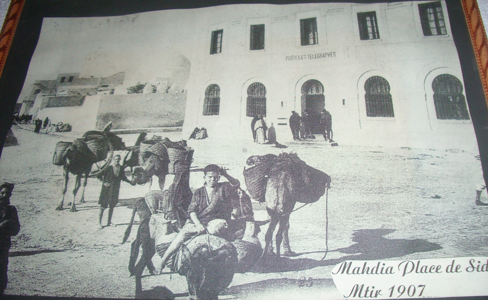 Mahdia 1907